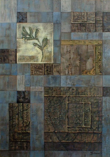 Jánosi Katalin (1951. november 2. -) magyar festő- és gobelinművész alkotása: Múzeum, 1998, olajfestmény, 100x70 cm